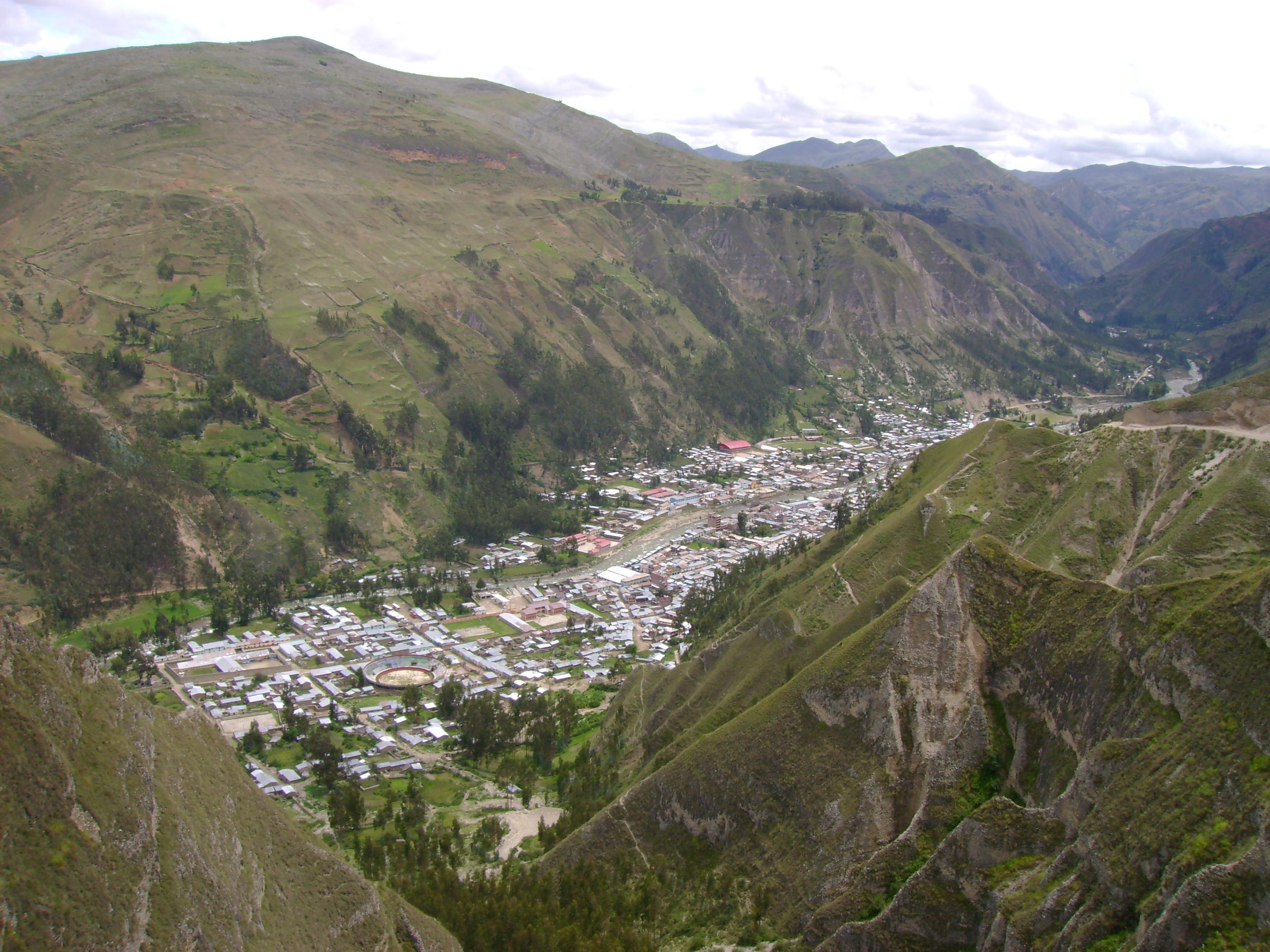 La Union, desde Gangash